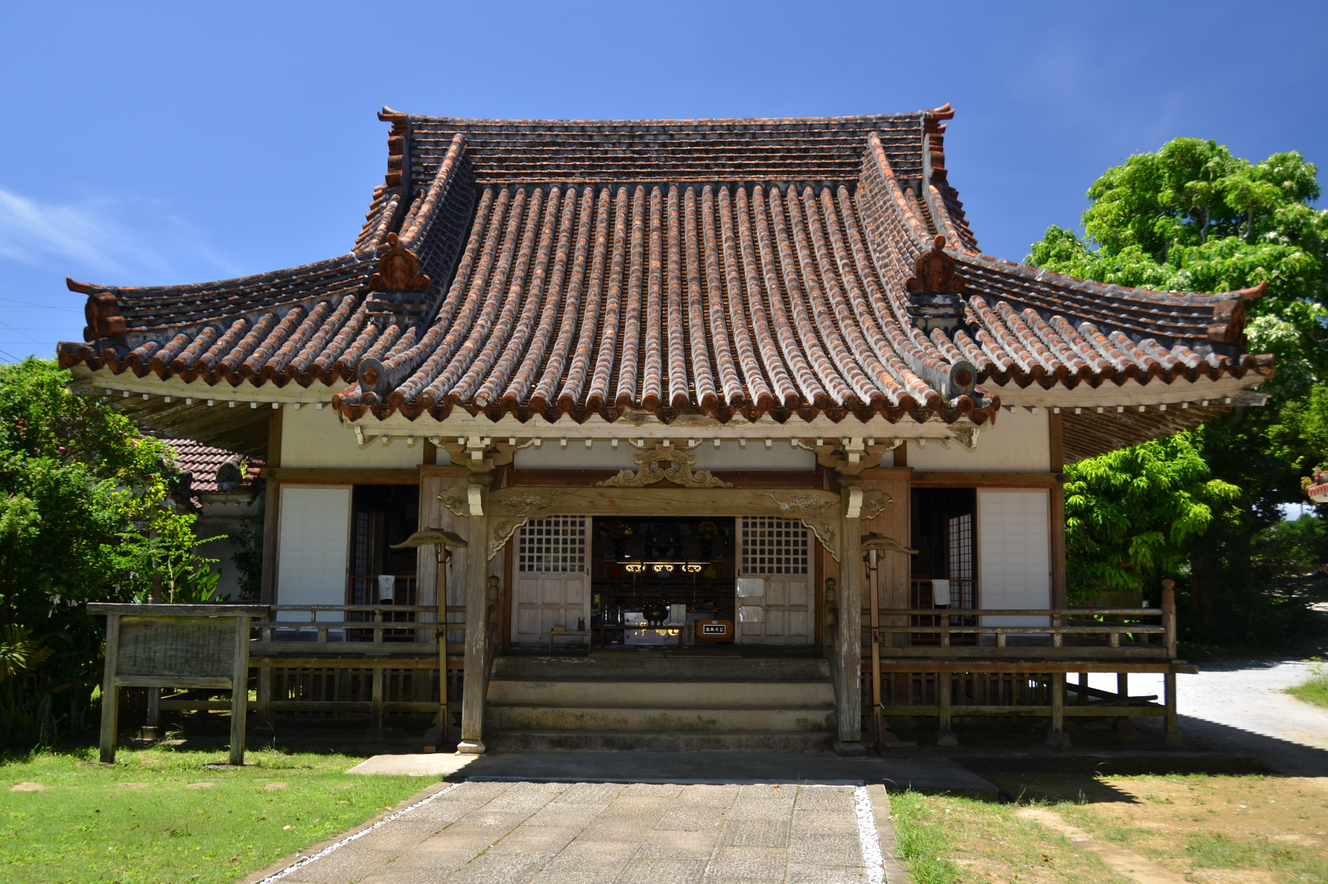 沖縄県金武町にある金武観音寺の本堂